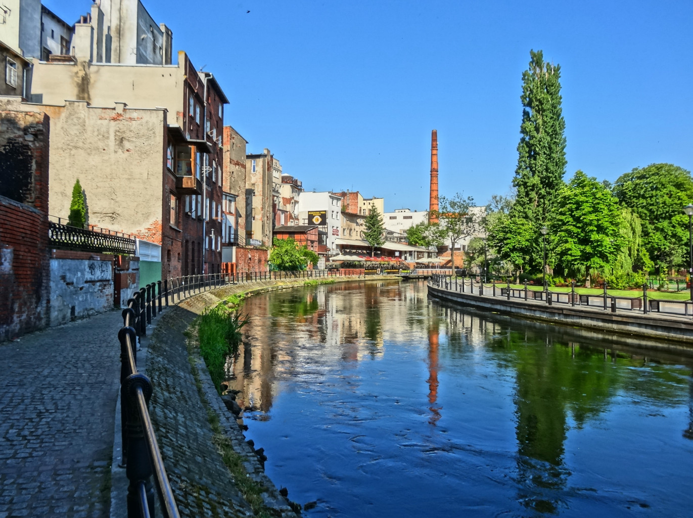 Wenecja Bydgoska – zespół architektoniczny Starego Miasta w Bydgoszczy zbudowany bezpośrednio nad rzeką Młynówką.